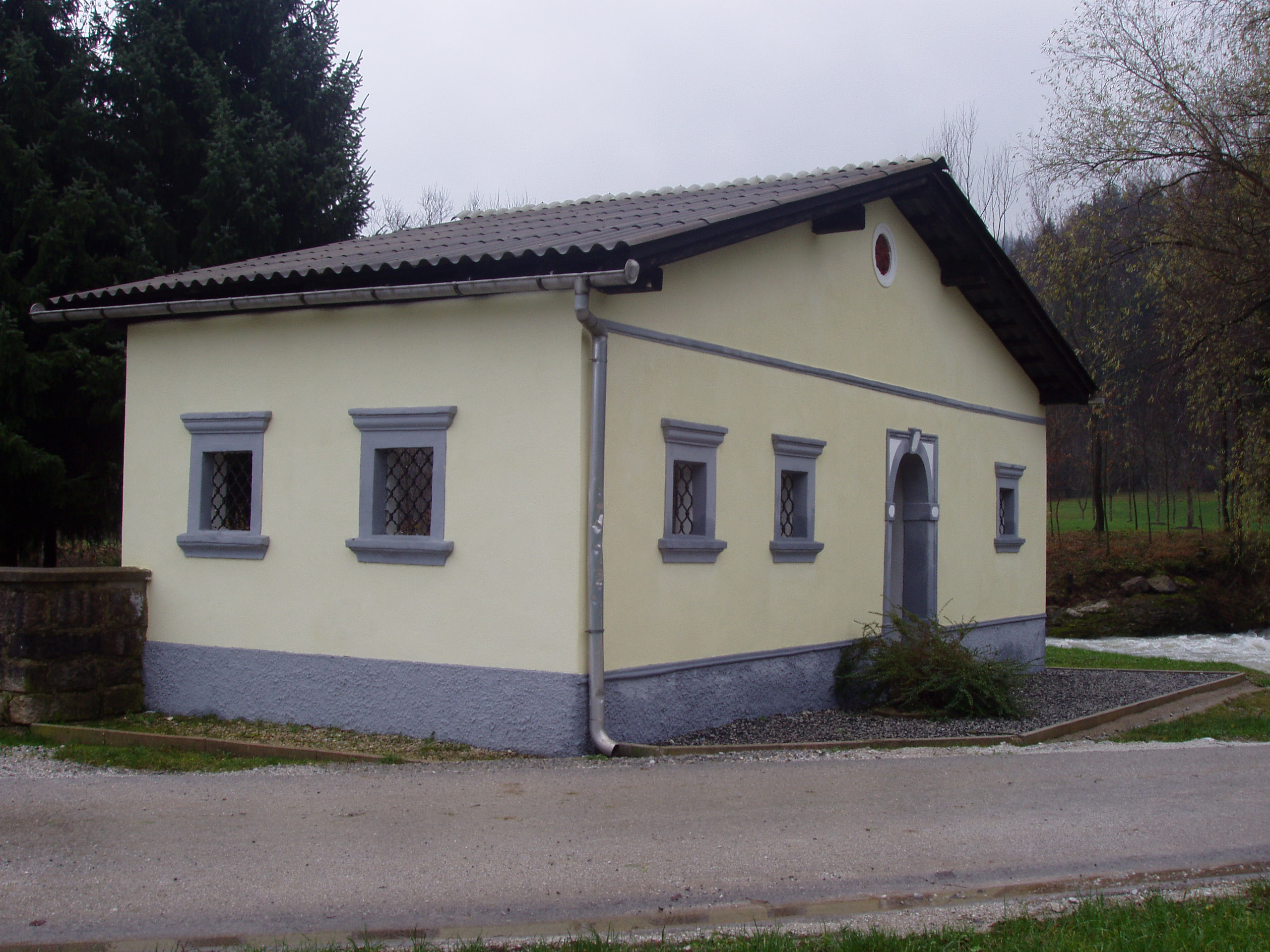 Veštrski mlin je kulturni spomenik lokalnega pomena Škofje Loke. Med 2 Svetovno vojno je bila pod njim partizanska tehnika. 8 februarja 1944 so nemški vojaki, ker tehnike niso odkrili, požgali sosedovo hišo,hlev,žago in mlin. V njej so umrli Gosar Pavel, Markič Matevž, Andervaold Beno in Janša Silva.